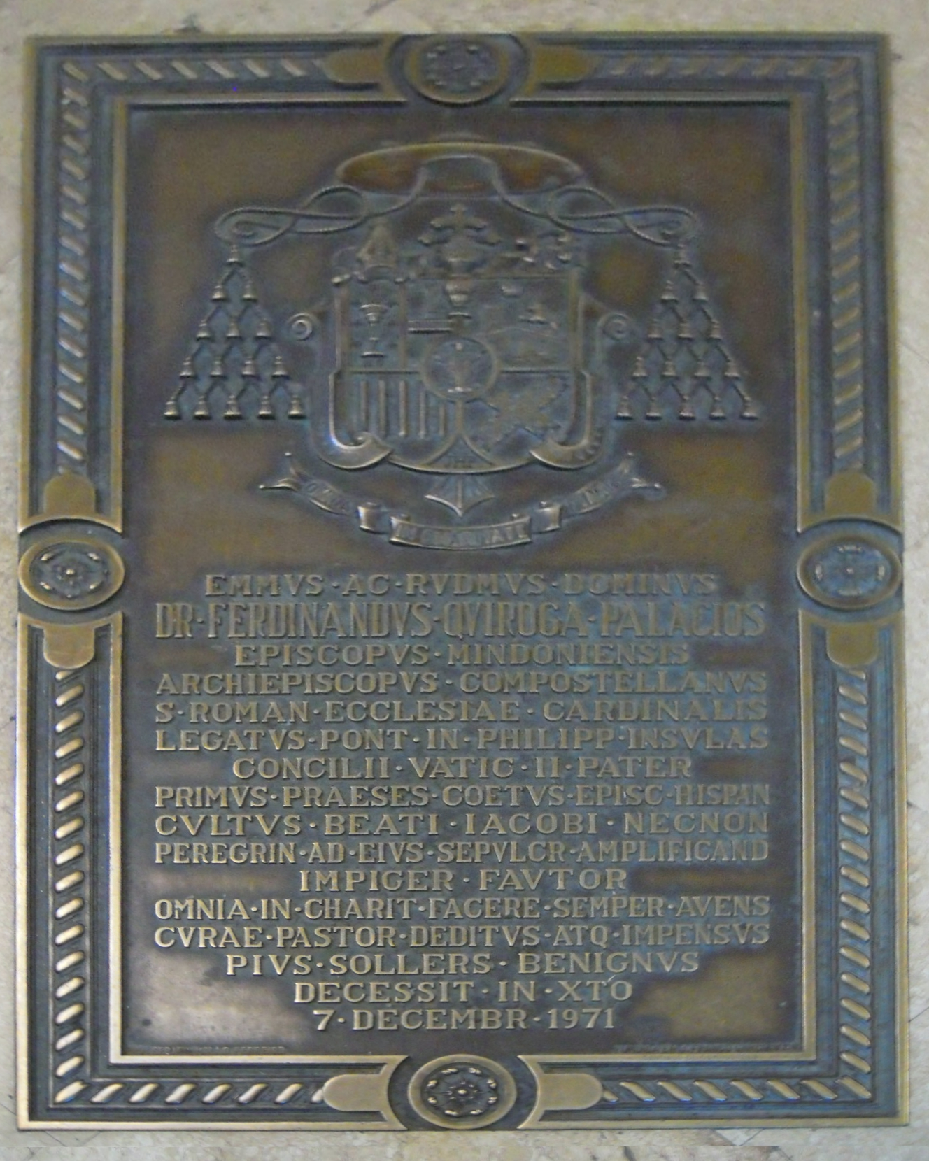 Lápida de Fernando Quiroga Palacios ao pé do Pórtico da Gloria da Catedral de Santiago de Compostela